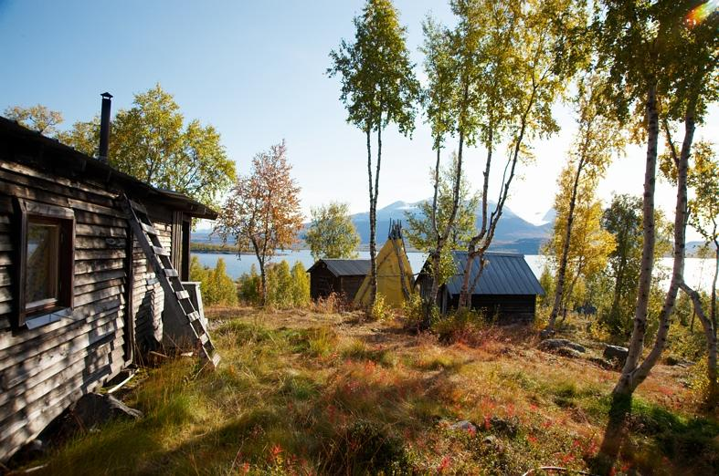 Vid Ritsem. Laponia världsarv. Motiv: Östra Ritjemjåkks sameviste Nyckelord: Riksintressen, Världsarv Kategori: Fjällmiljö, Nationalpark Vid Ritsem. Laponia världsarv.